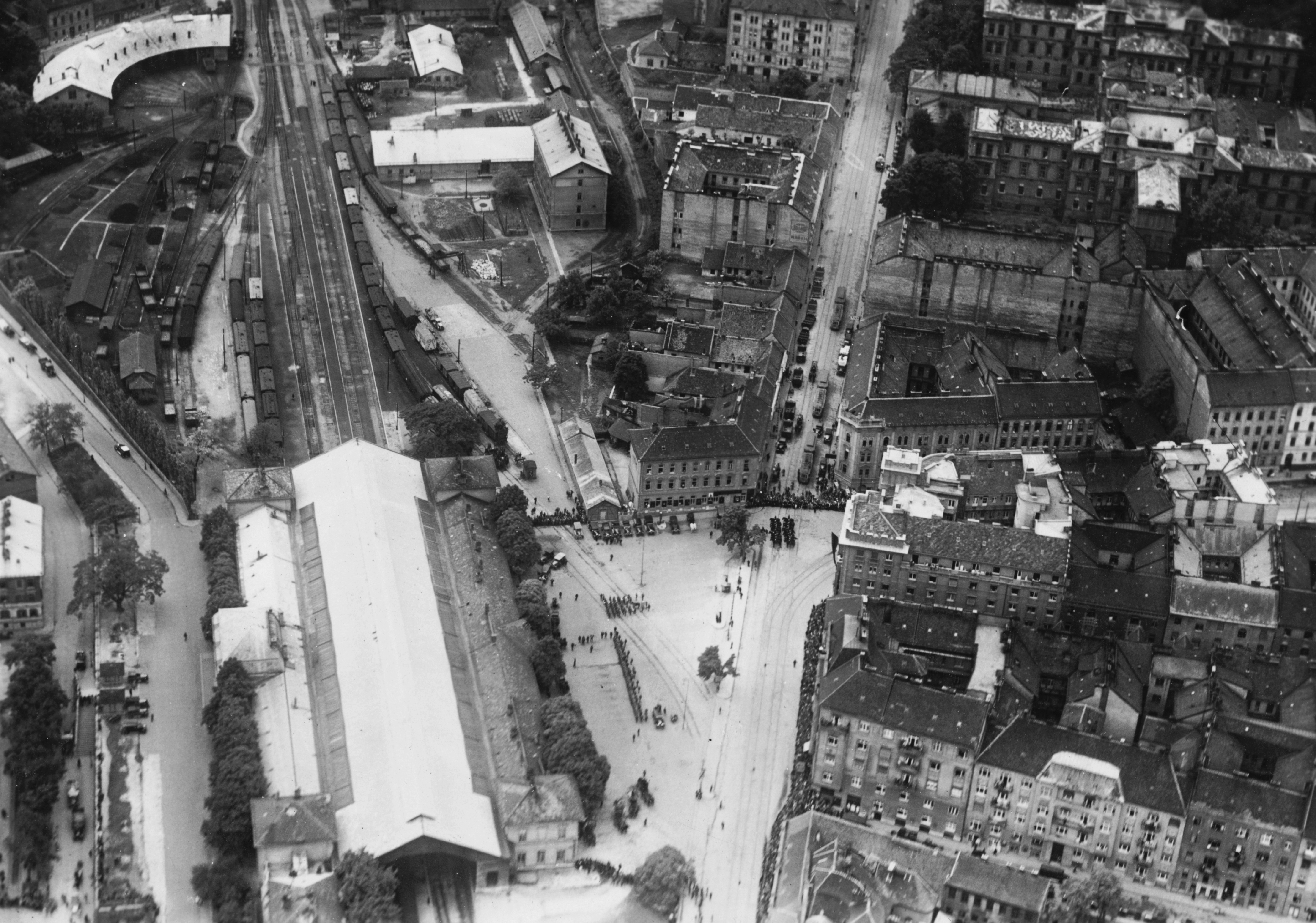 légifotó a Déli pályaudvar és az Alkotás utca környékéről. Location: Hungary, Budapest Tags: railway, aerial photo, train station, bird's eye view Title: légifotó a Déli pályaudvar és az Alkotás utca környékéről.